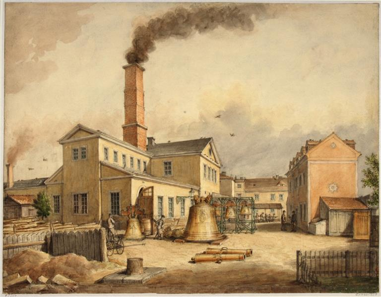 Die Glockengießerei des Königlich-Sächsischen Stück- und Glockengießers Johann Gotthelf Große (1808–1869, später Hermann Große) in Dresden